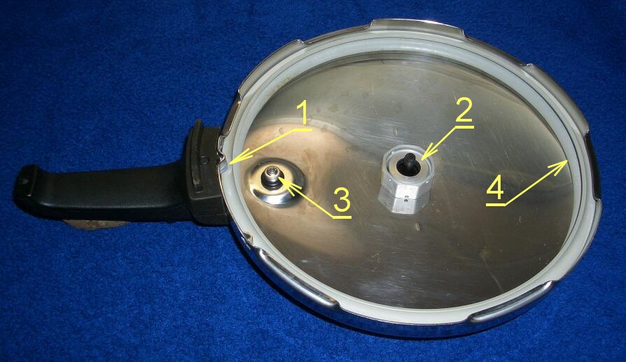 Pressure cooker, cap, interior view Schnellkochtopf, Deckel, Innenansicht